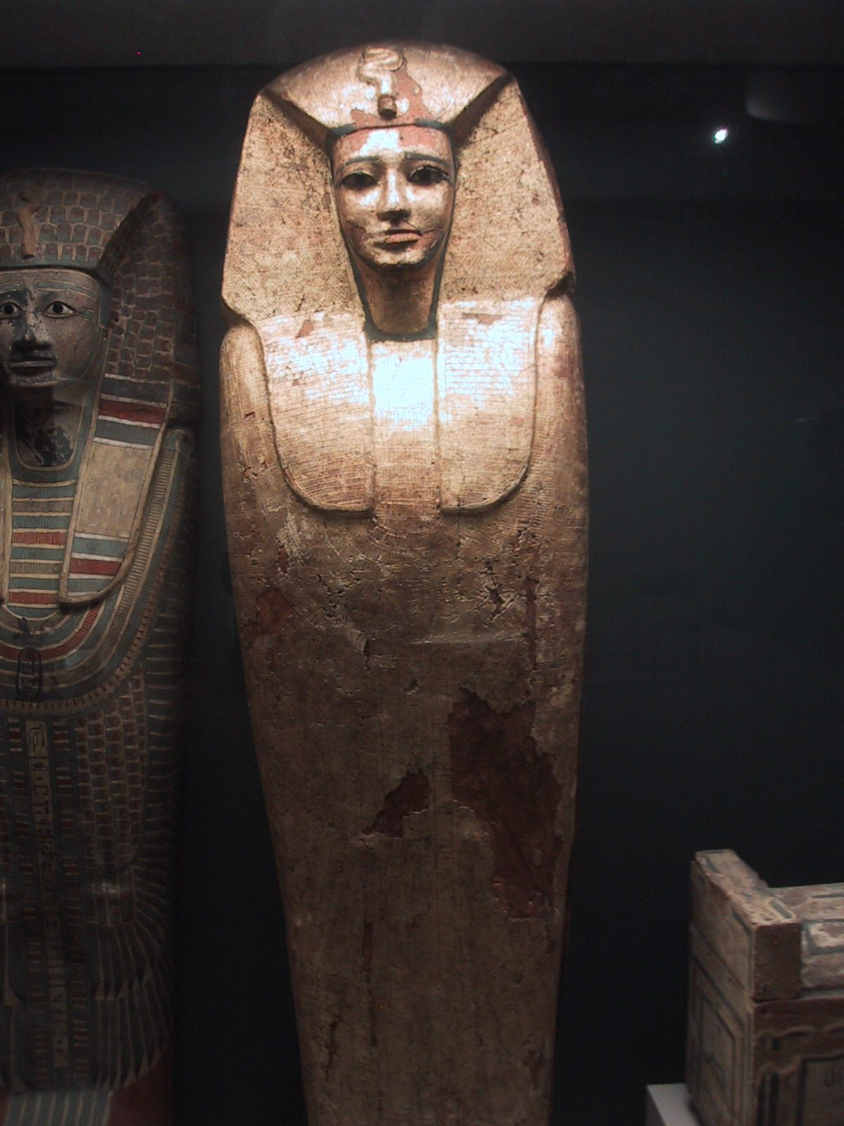 Couvercle et cercueil d'un roi Antef (Sékhemrê Oupmaât). 17e dynastie.